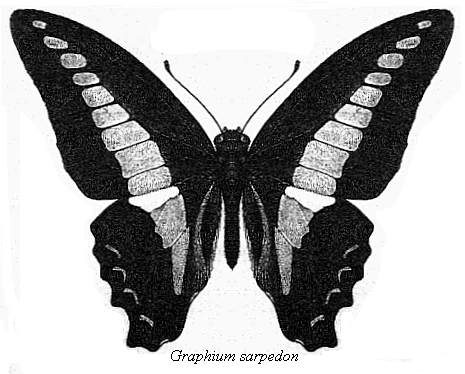 Graphium sarpedon (Linnaeus, 1758)